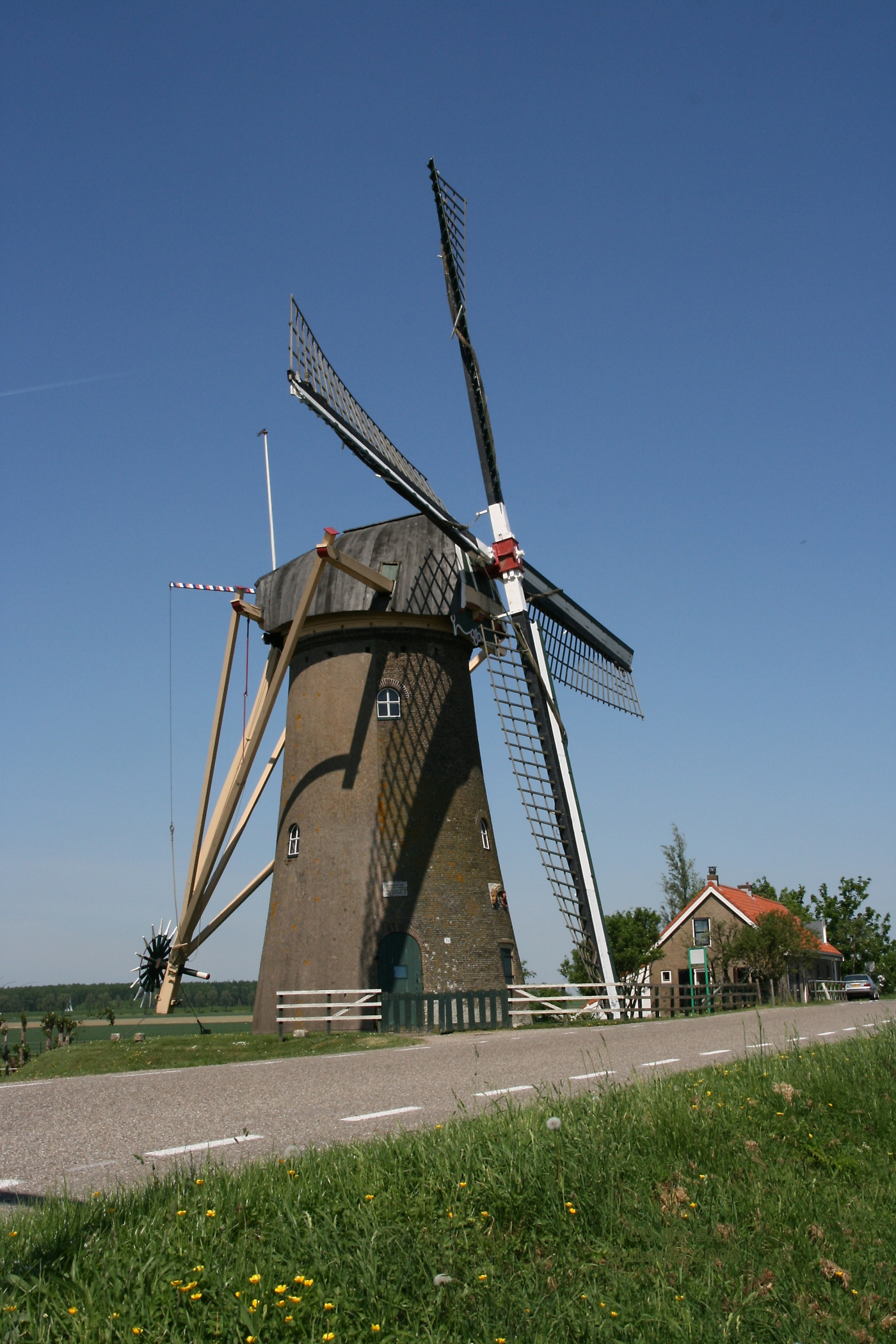 Piershil: Korenmolen "Simonia"